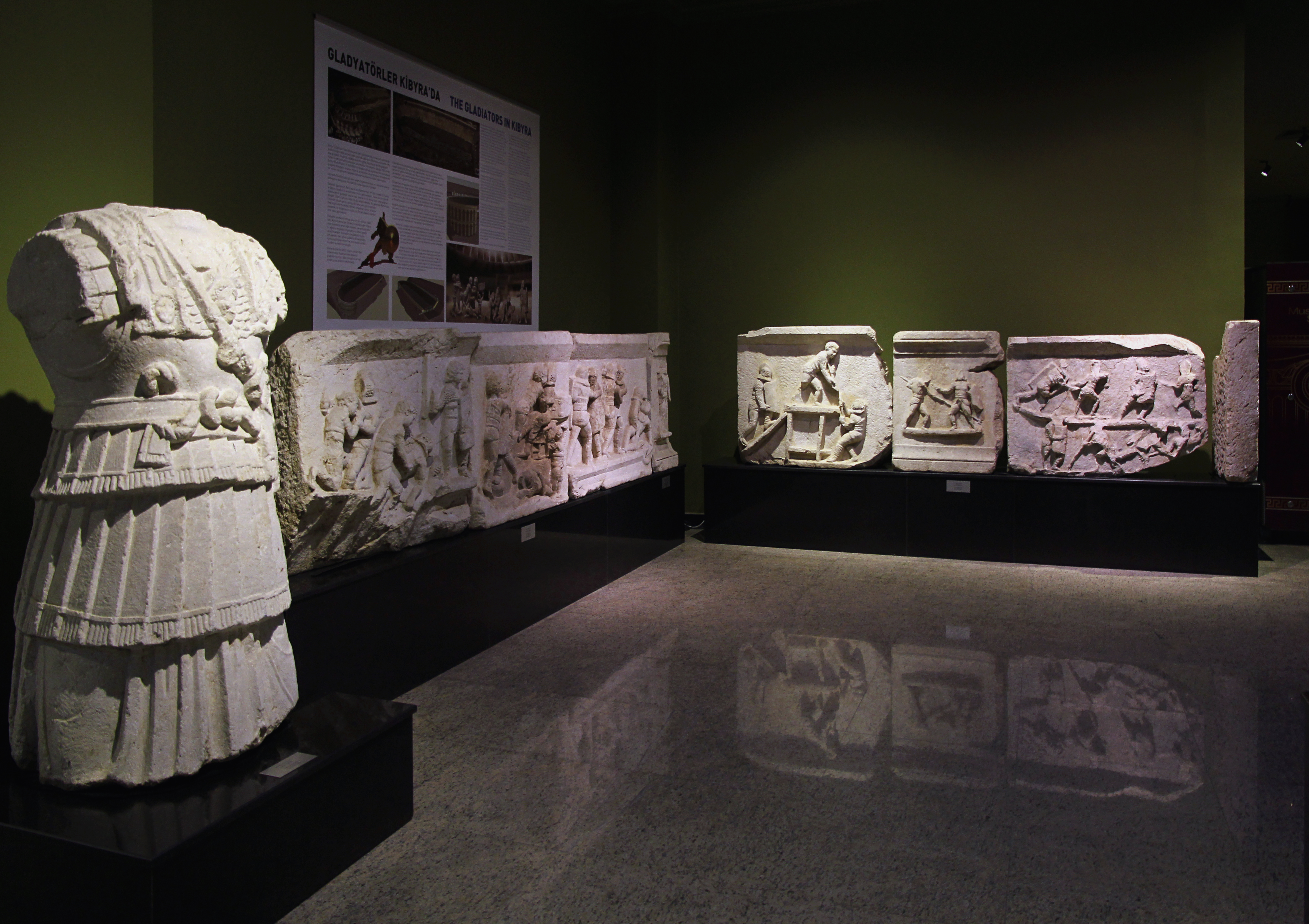 Archäologisches Museum Burdur, Südwesttürkei, Gladiatorenreliefs aus Kibyra